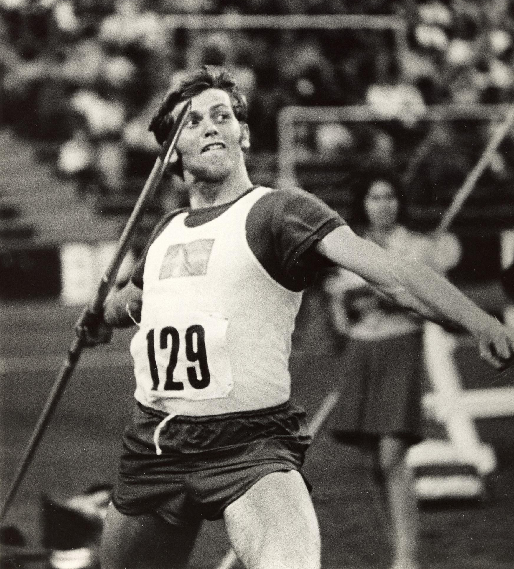 Åke Nilsson